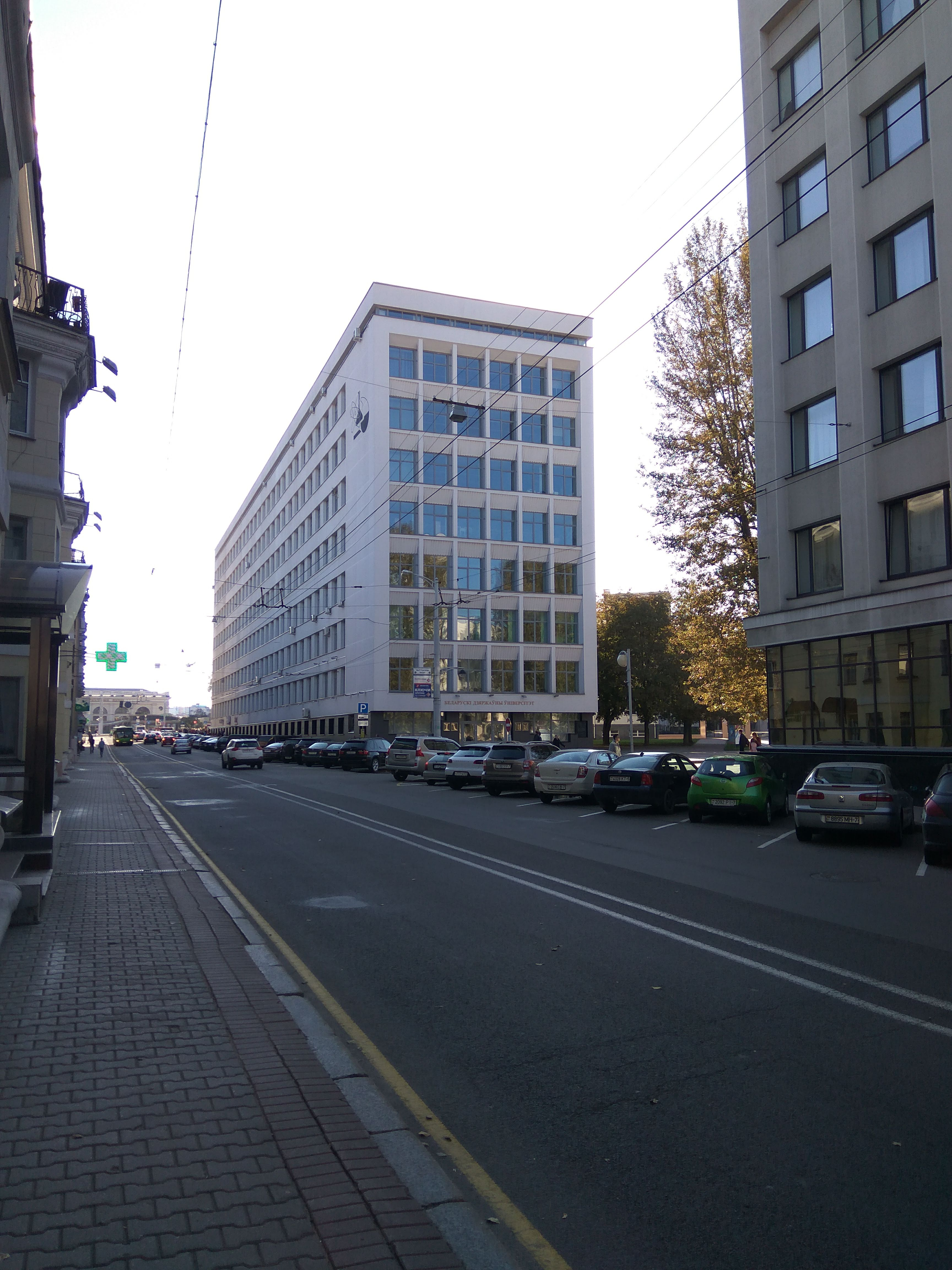 Мінск. Ленінградская вуліца (кастрычнік 2018)